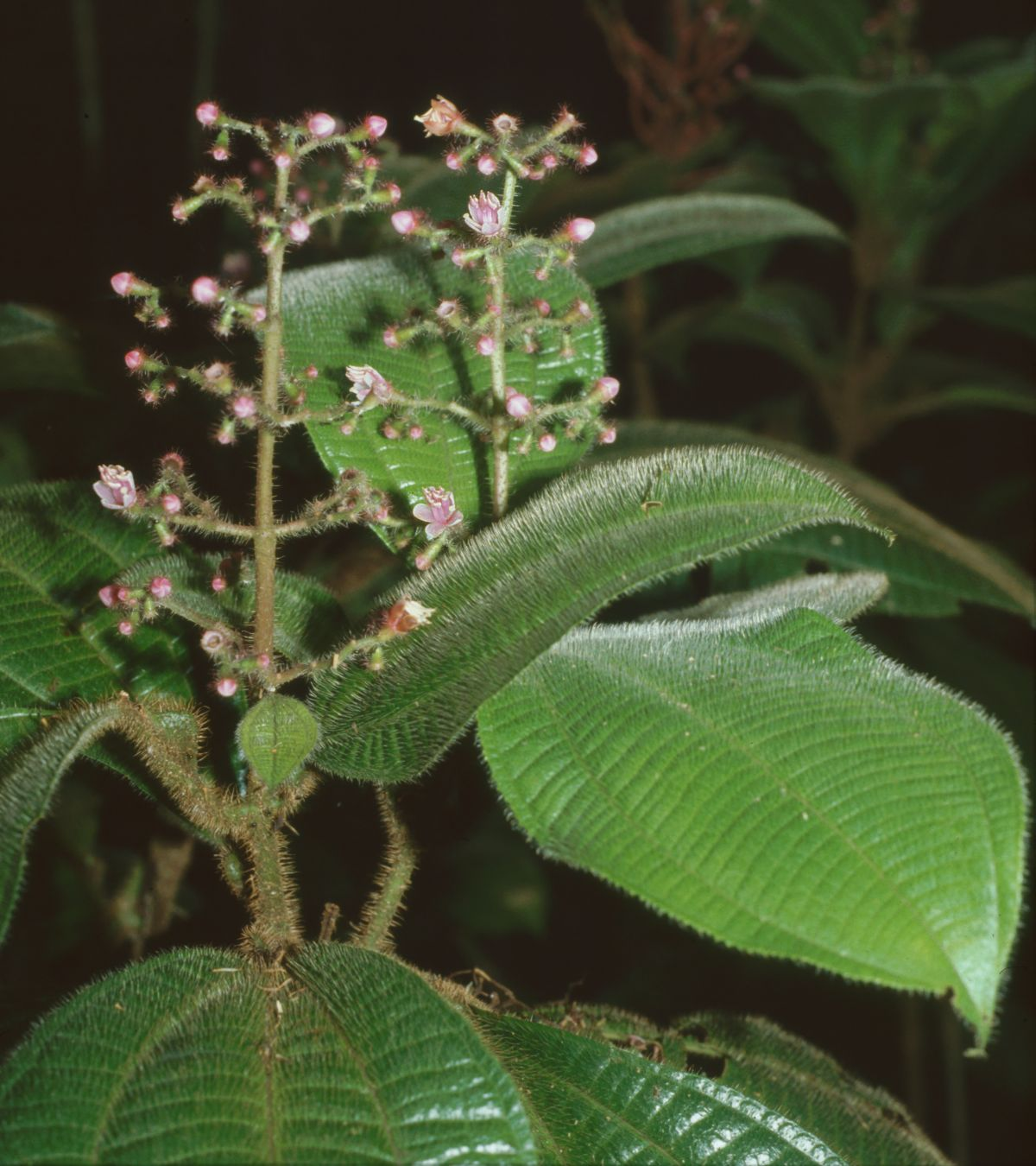 Tococa guianensis, Schwarzmundgewächse (Melastomataceae) - Costa Rica: Prov. Puntarenas, PN Piedras Blancas, Bosque Esquinas bei La Gamba